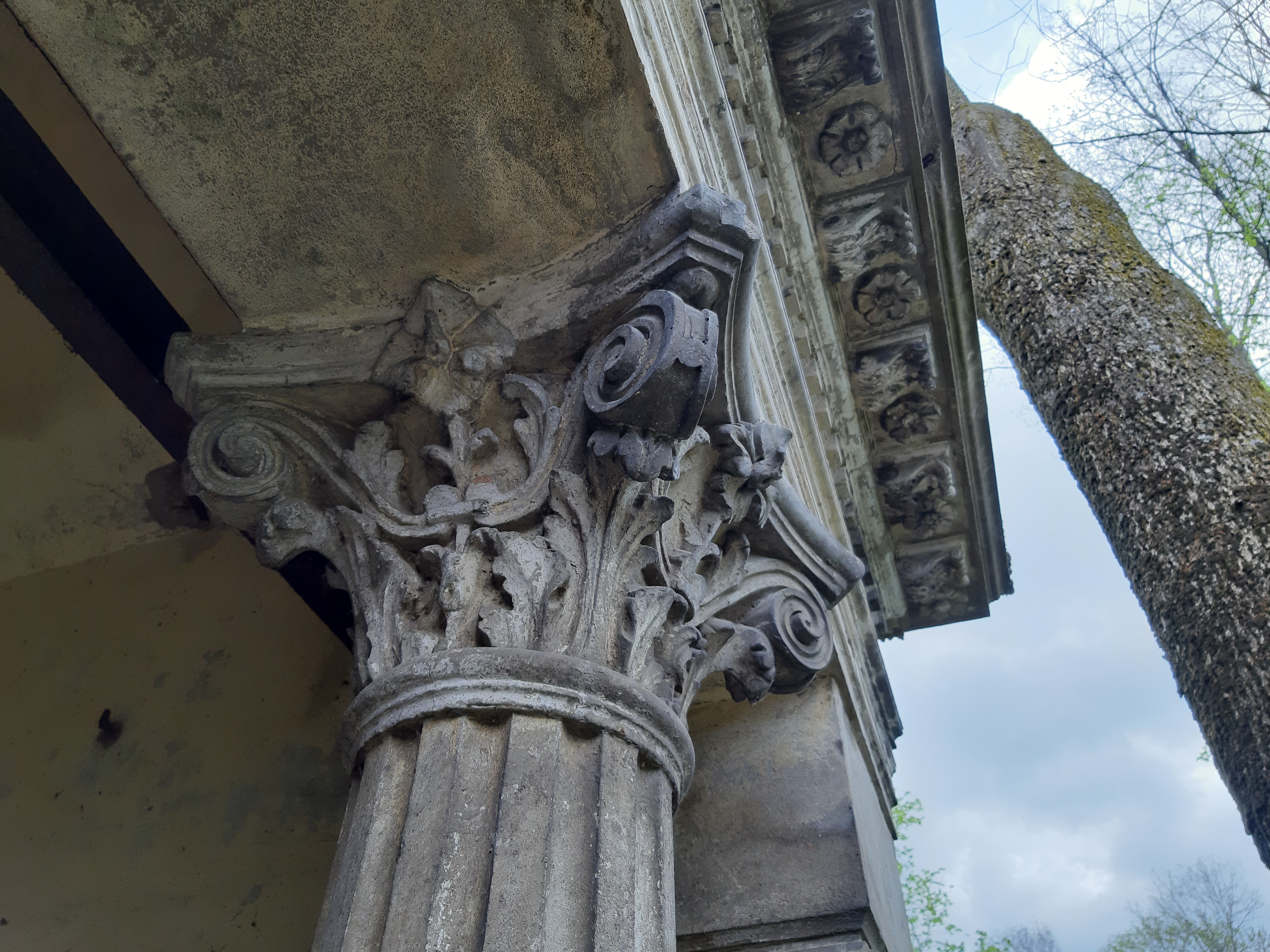 Магілёў. Успенскія могілкі